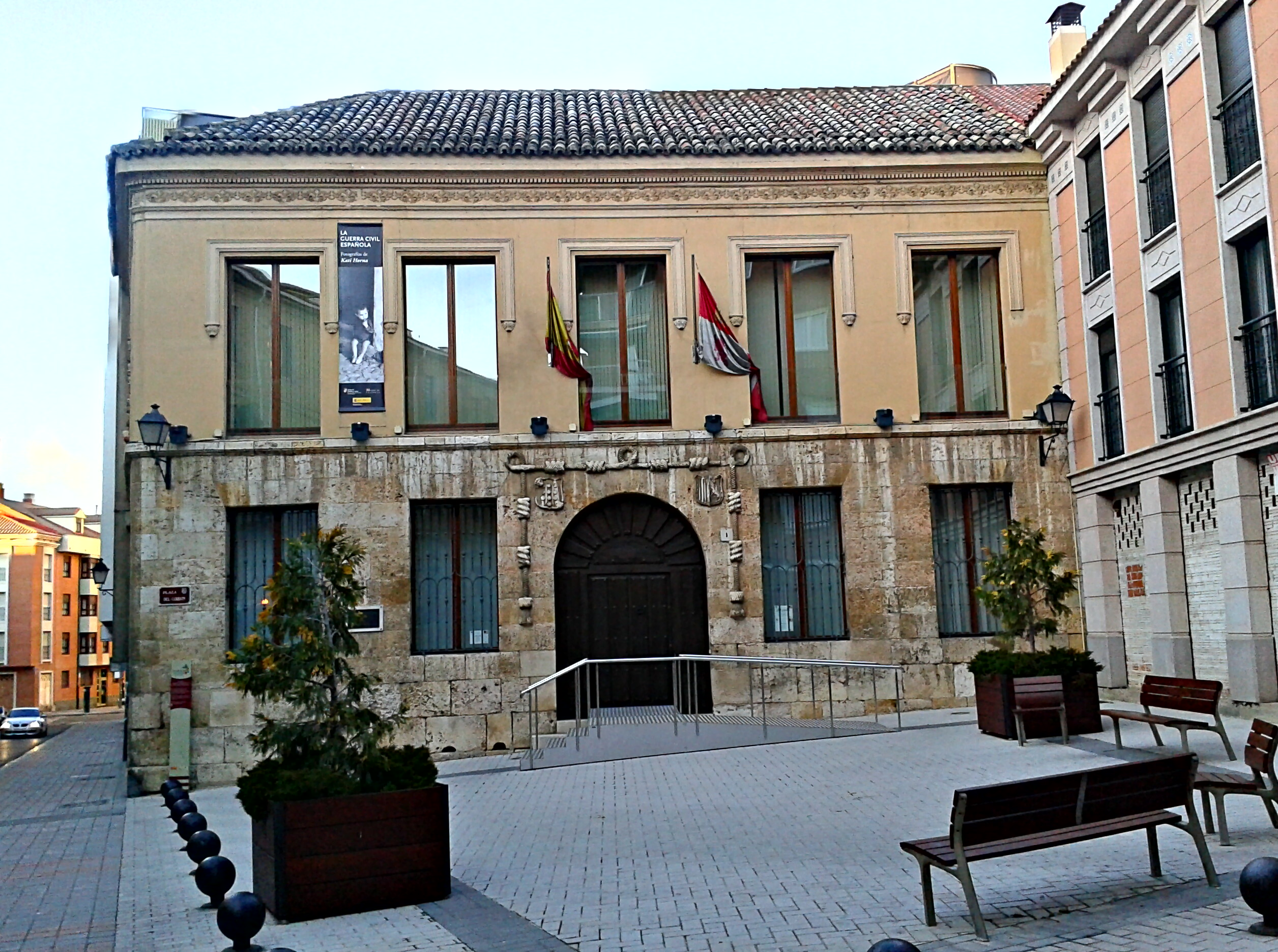 Fachada del Museo Arqueológico de Palencia, situado en la Casa del Cordón de Palencia (España).